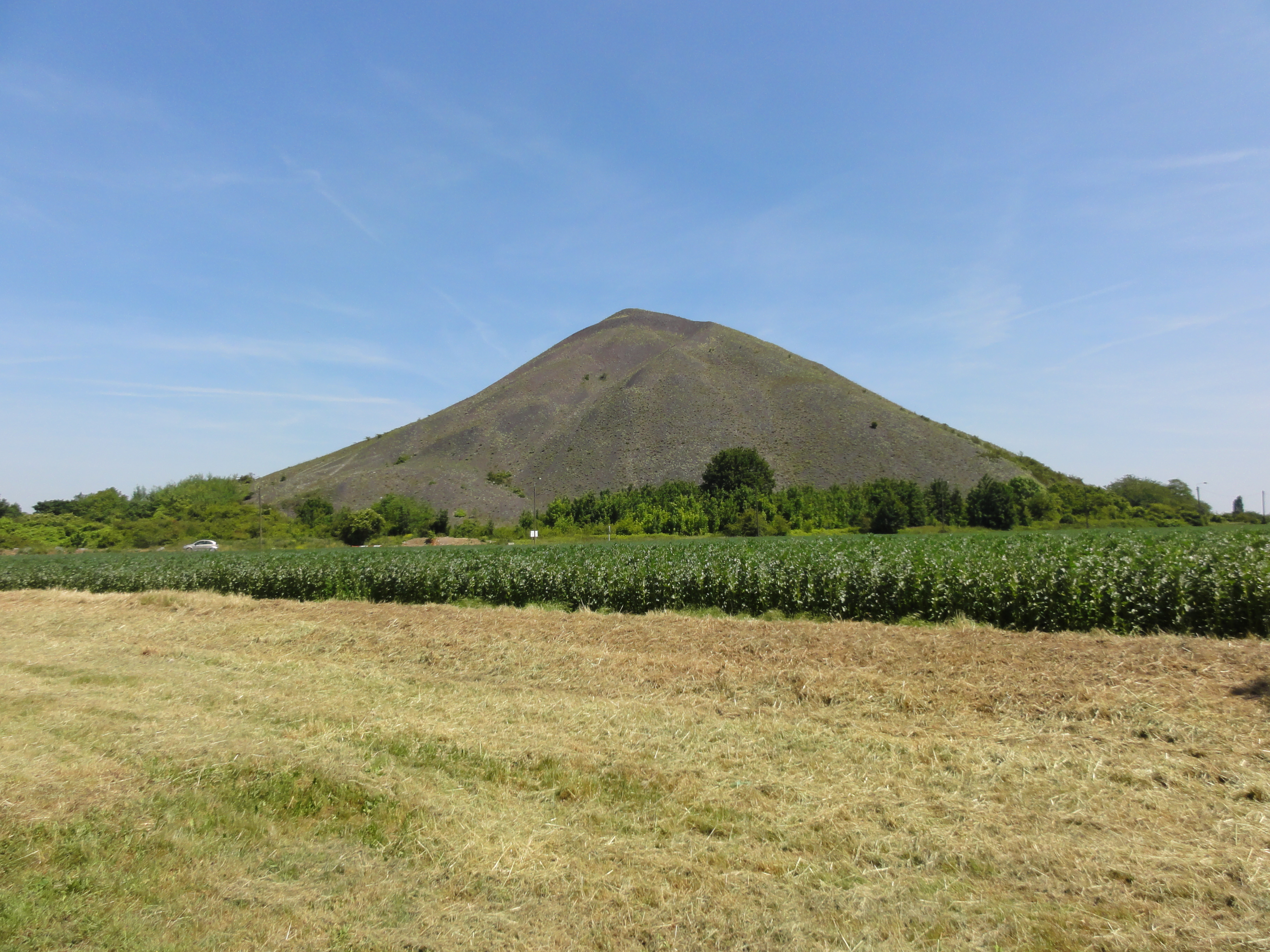 Terril n° 93 dit 21 Nord de Courrières, fosse n° 21 - 22 de la Compagnie des mines de Courrières dans le bassin minier du Nord-Pas-de-Calais, Harnes, Pas-de-Calais, Nord-Pas-de-Calais, France. Le terril no 93 est inscrit sur la liste du patrimoine mondial de l'Unesco le 30 juin 2012 et y constitue en partie le site no 51.